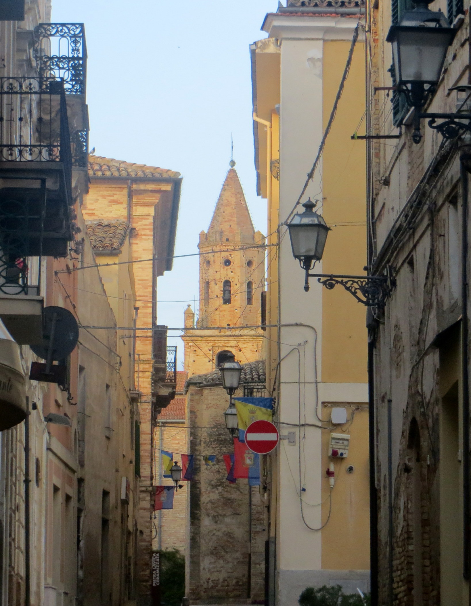 Vicolo a Città Sant' Angelo (PE)